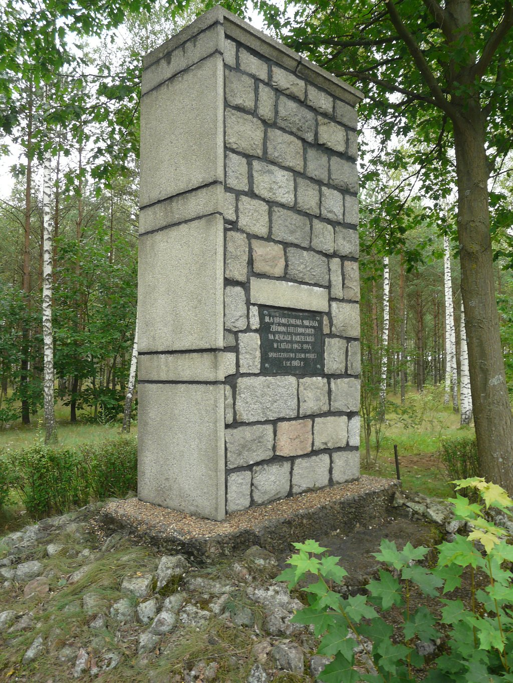 Odrestaurowany pomnik w Dłutowie